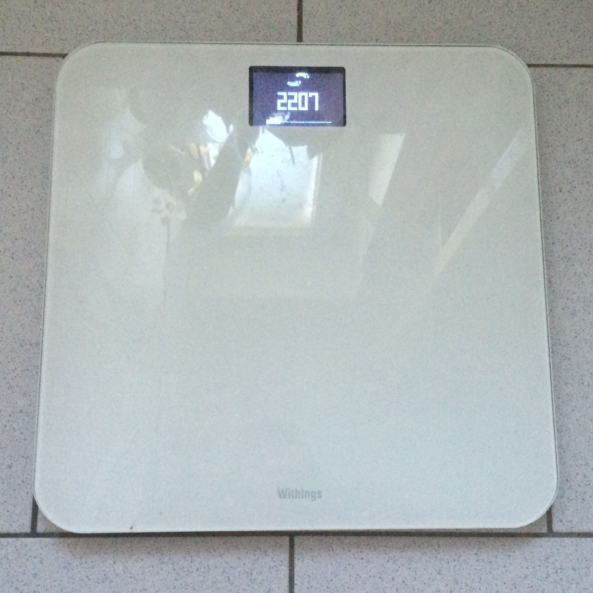 Withings-Waage WS30 mit Angabe der gelaufenen Schritte vom Vortag (über WiFi)